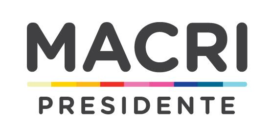 Imagen de campaña de Mauricio Macri